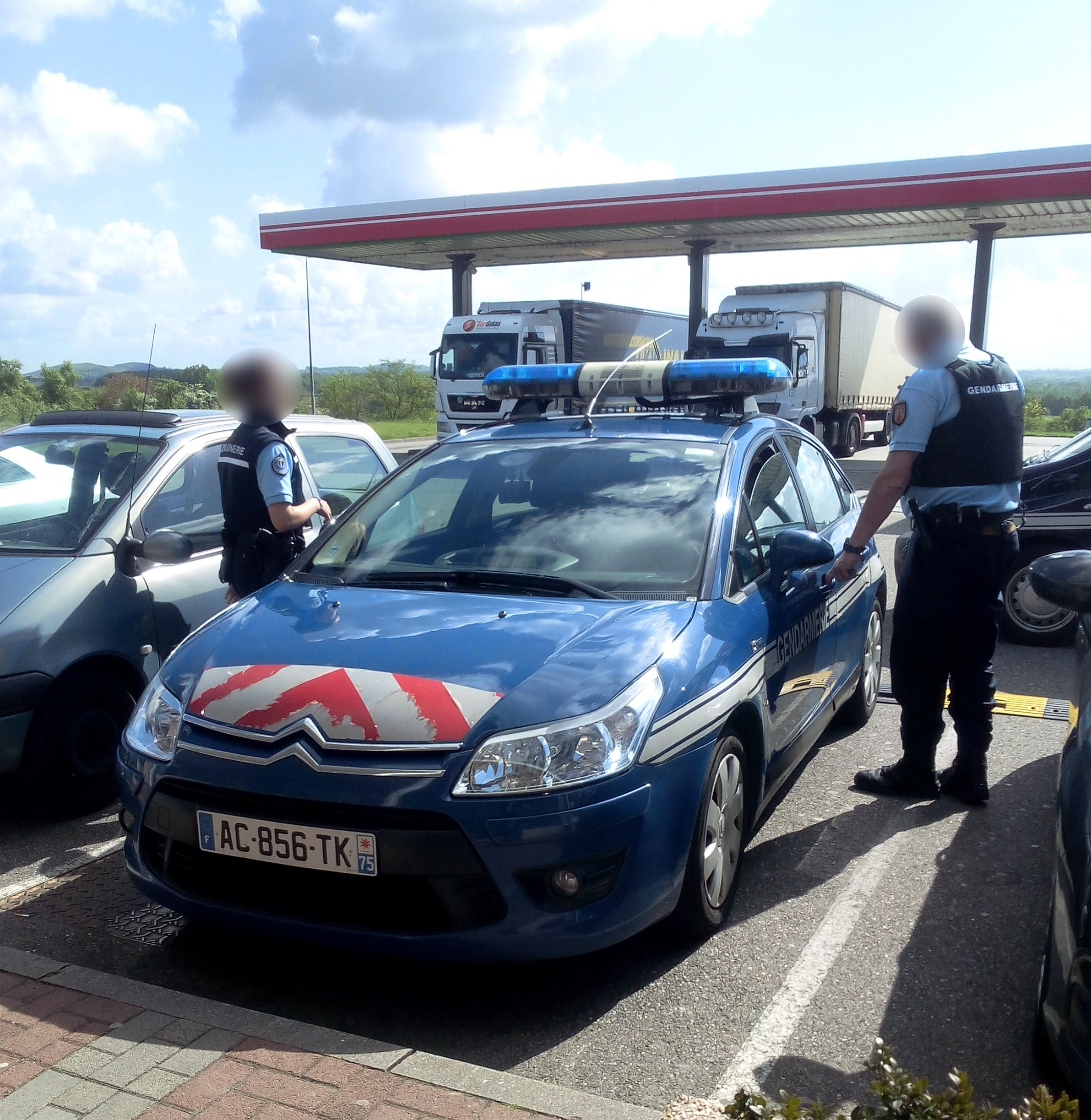 Citroën C4 de la gendarmerie nationale, équipée du système Lapi, à savoir «lecture automatique des places d'immatriculation», sur une aire d'autoroute en Alsace